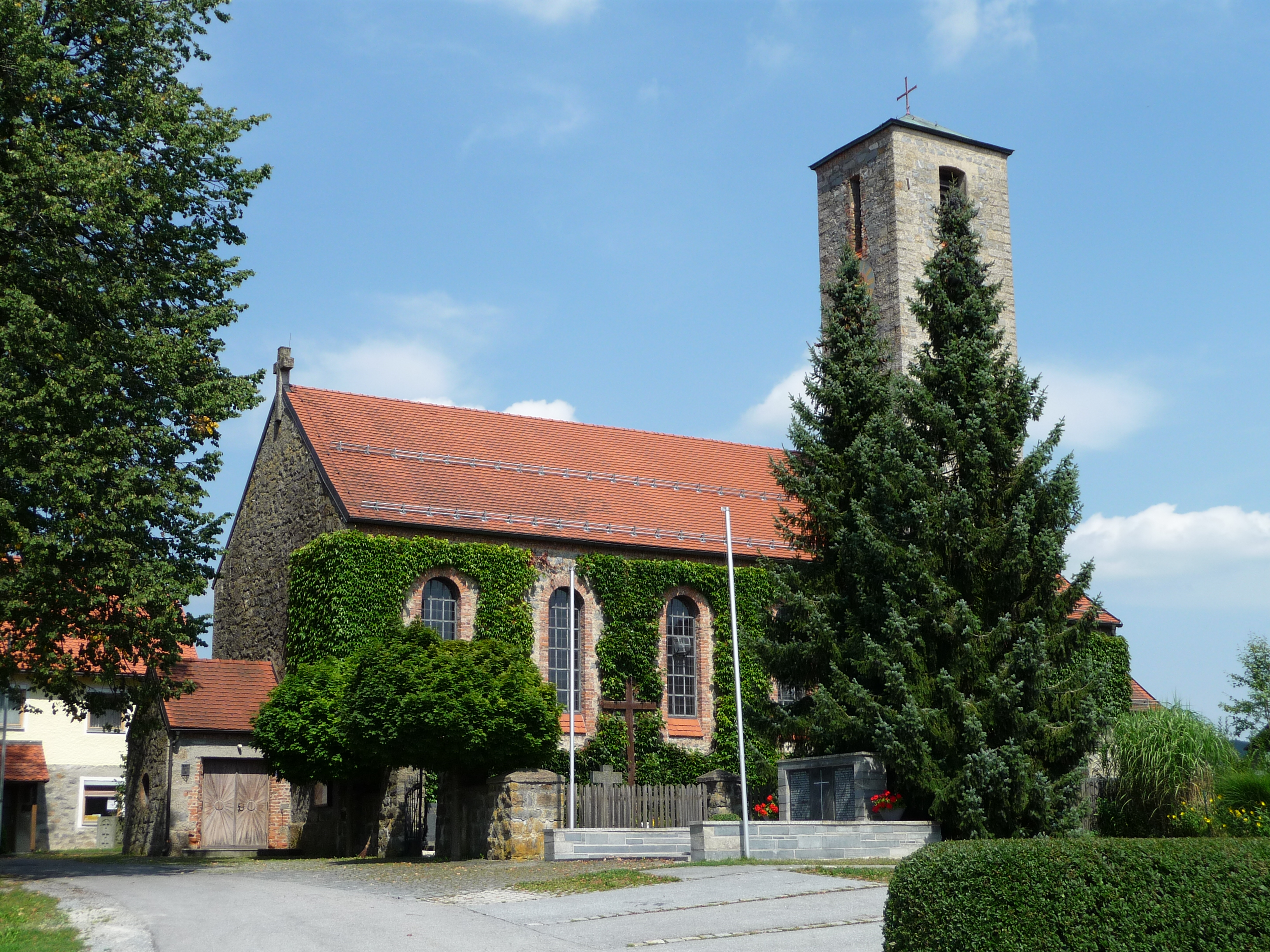 Die Expositurkirche St. Hartmann in Thannberg, Gemeinde Thurmansbang